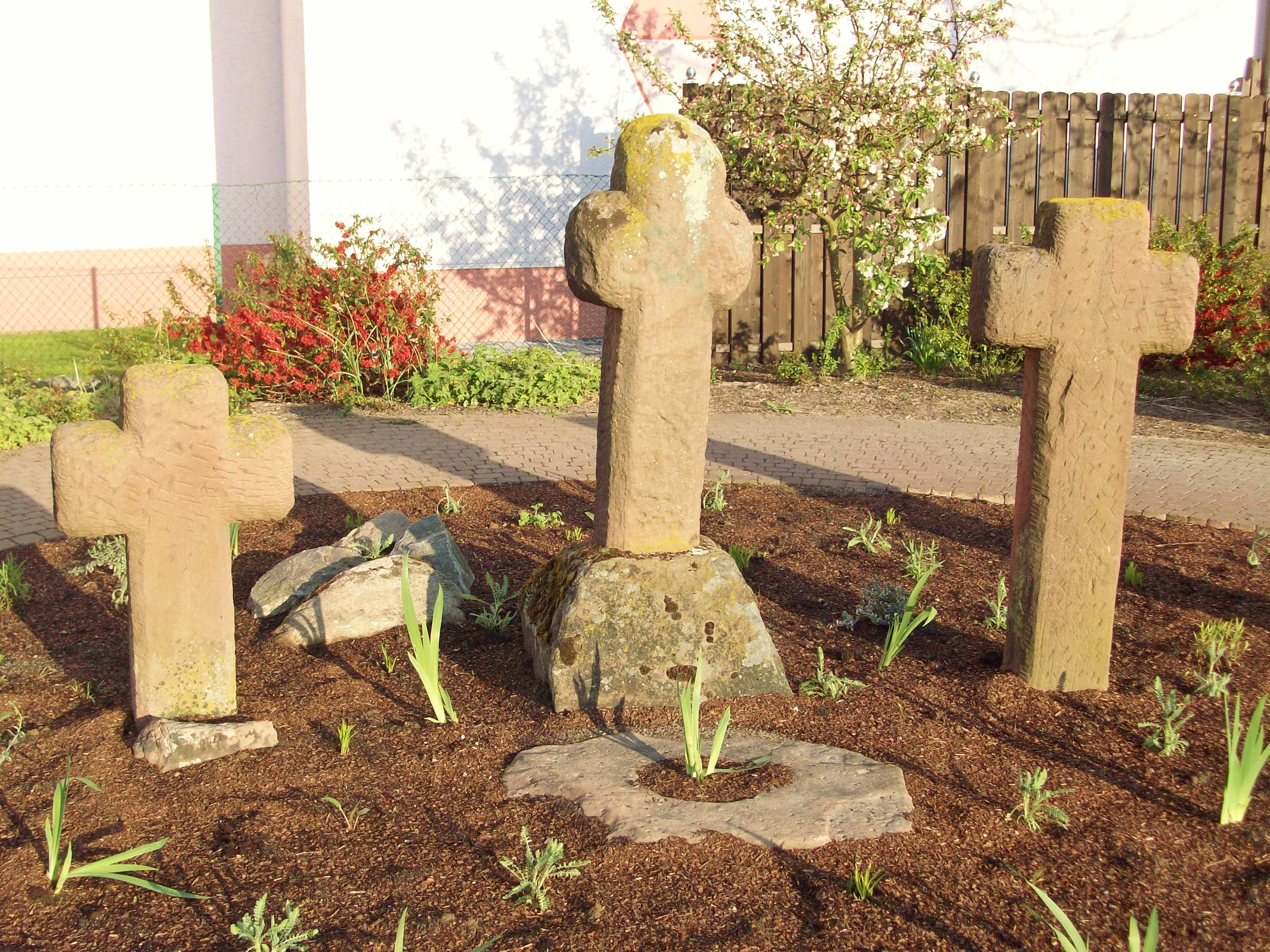 Die drei Steinkreuze, an denen die Sage des Ritters Reiner von Haydebach und des Streites der zwei Schwestern um die Gunst des Ritters entbrannte. Sie stehen in Verbindung mit der Ketzelburg